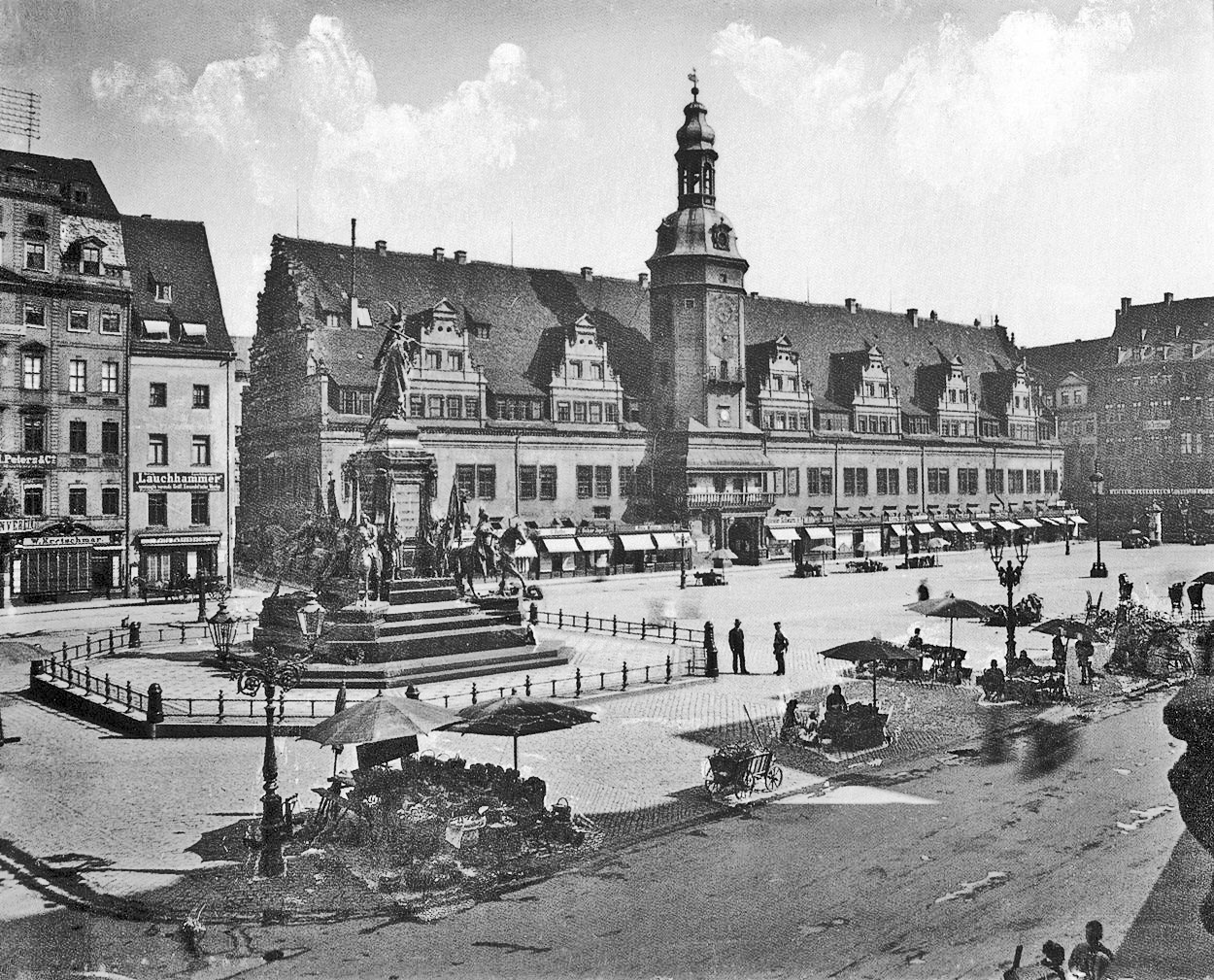 Marktplatz, Leipzig